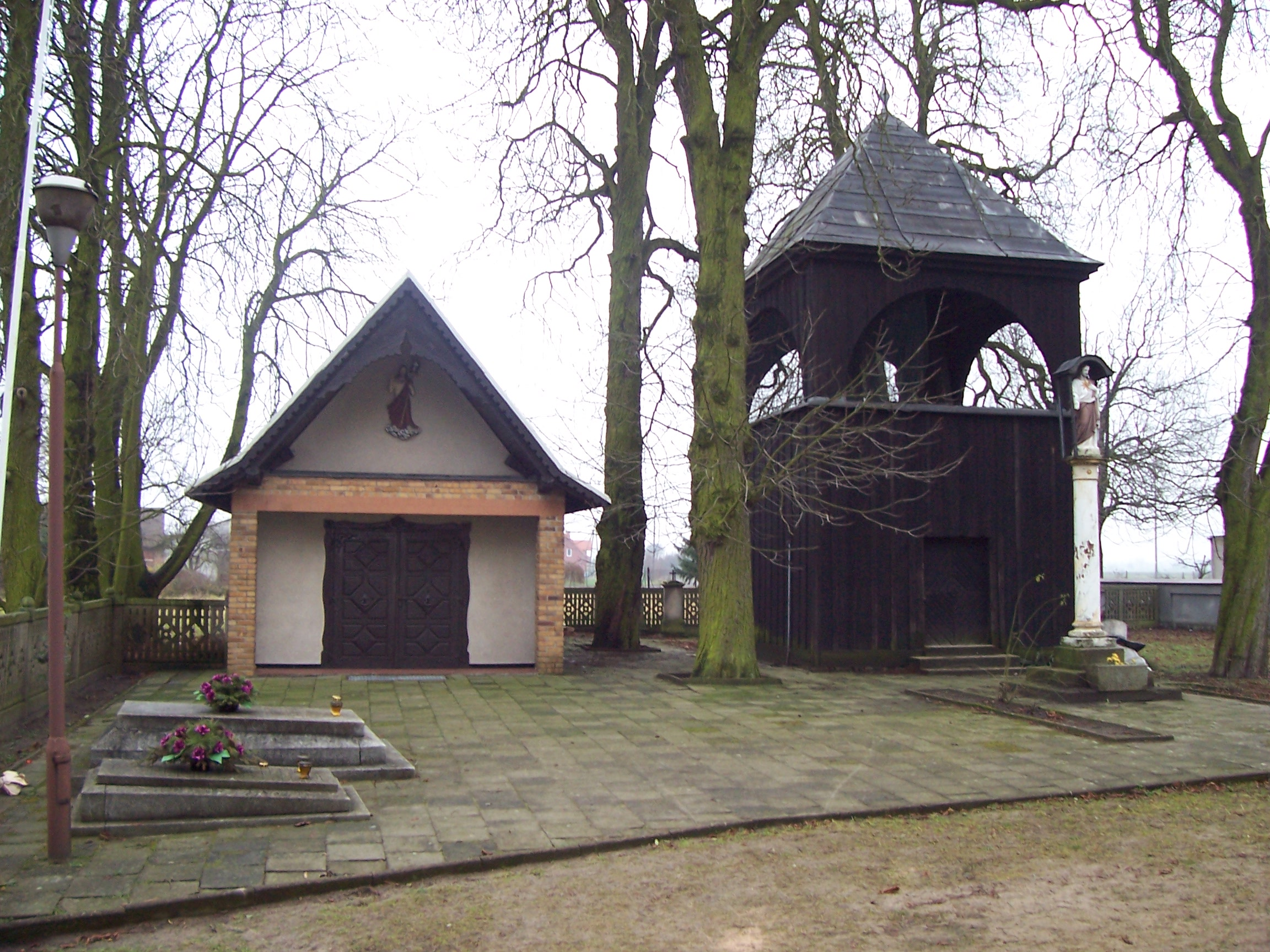 Zdjęcie mojego autorstwa wykonane 30 listopada 2004 przedstawia kostnicę (kaplicę pogrzebową) oraz dzwonnicę przy kościele parafialnym w Parkowie.